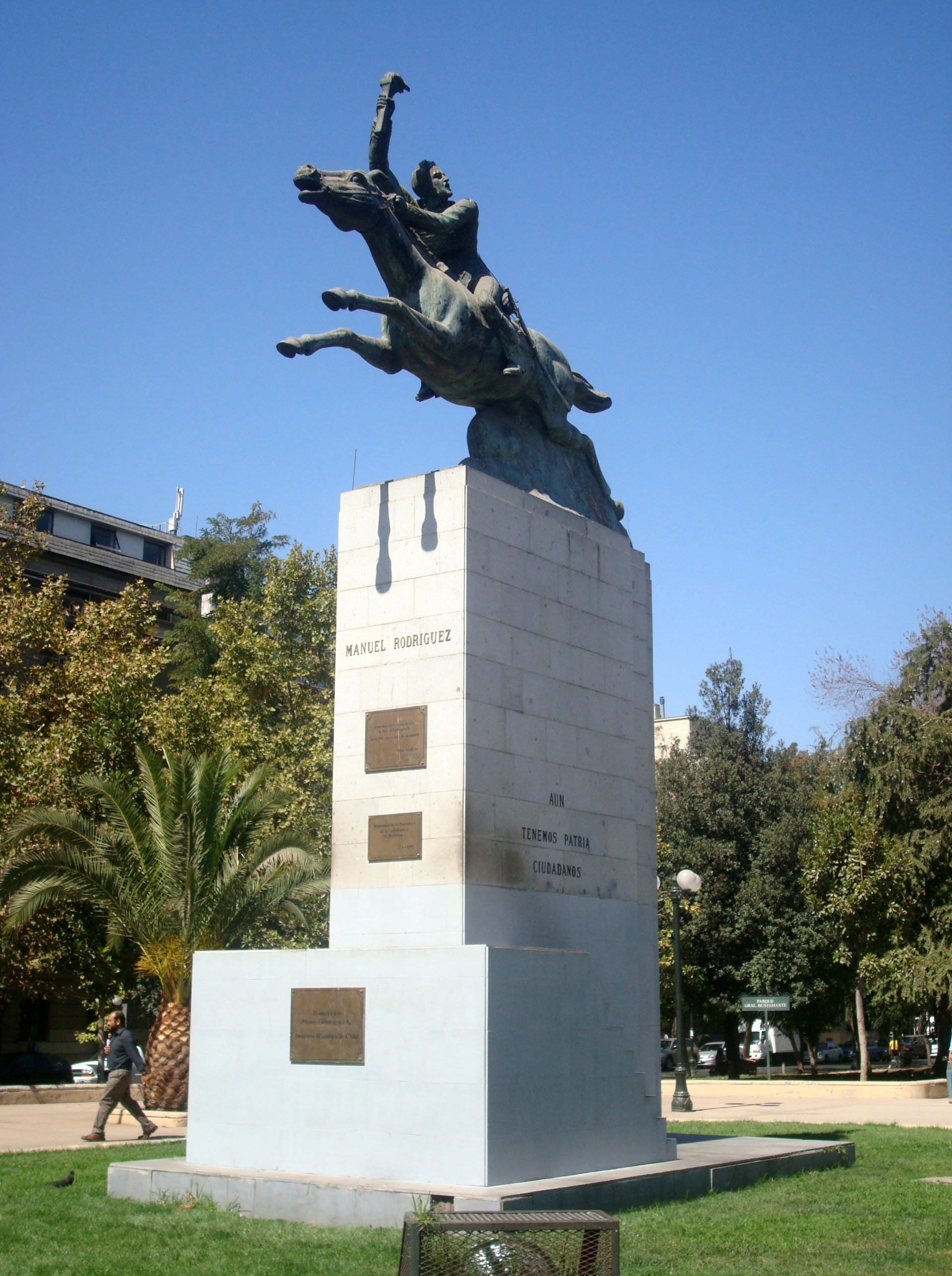 Monumento Manuel Rodríguez, Parque Bustamante, Santiago de Chile